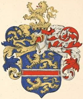 Helleri suguvõsa aadlivapp